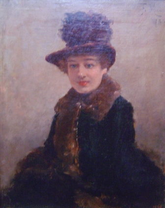 Figura